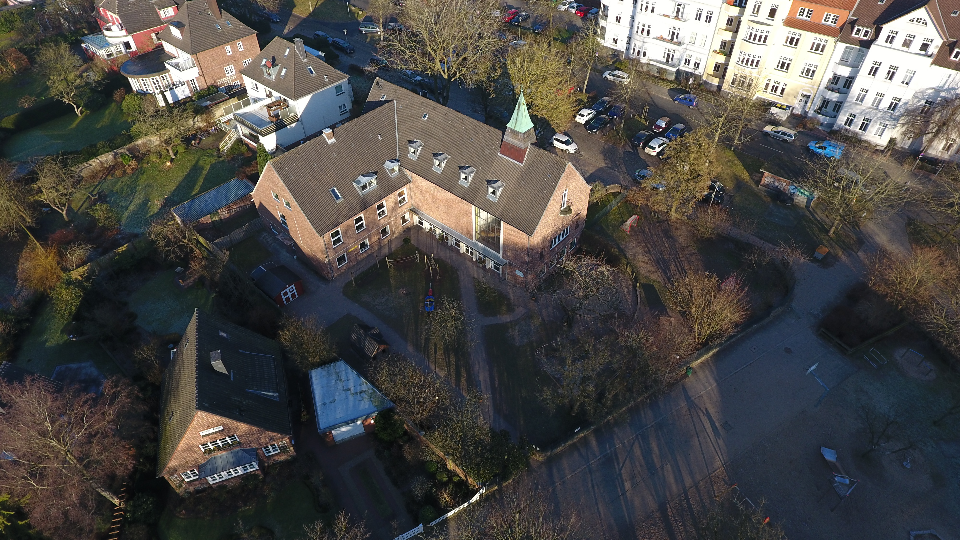 Blick auf die St. Gertrud Kirche in Flensburg